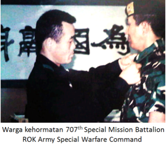 Jepang anugrah